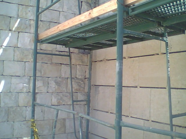 קיר חאמי וביר זית הקונסוליה האמריקאית בארנונה ירושלים